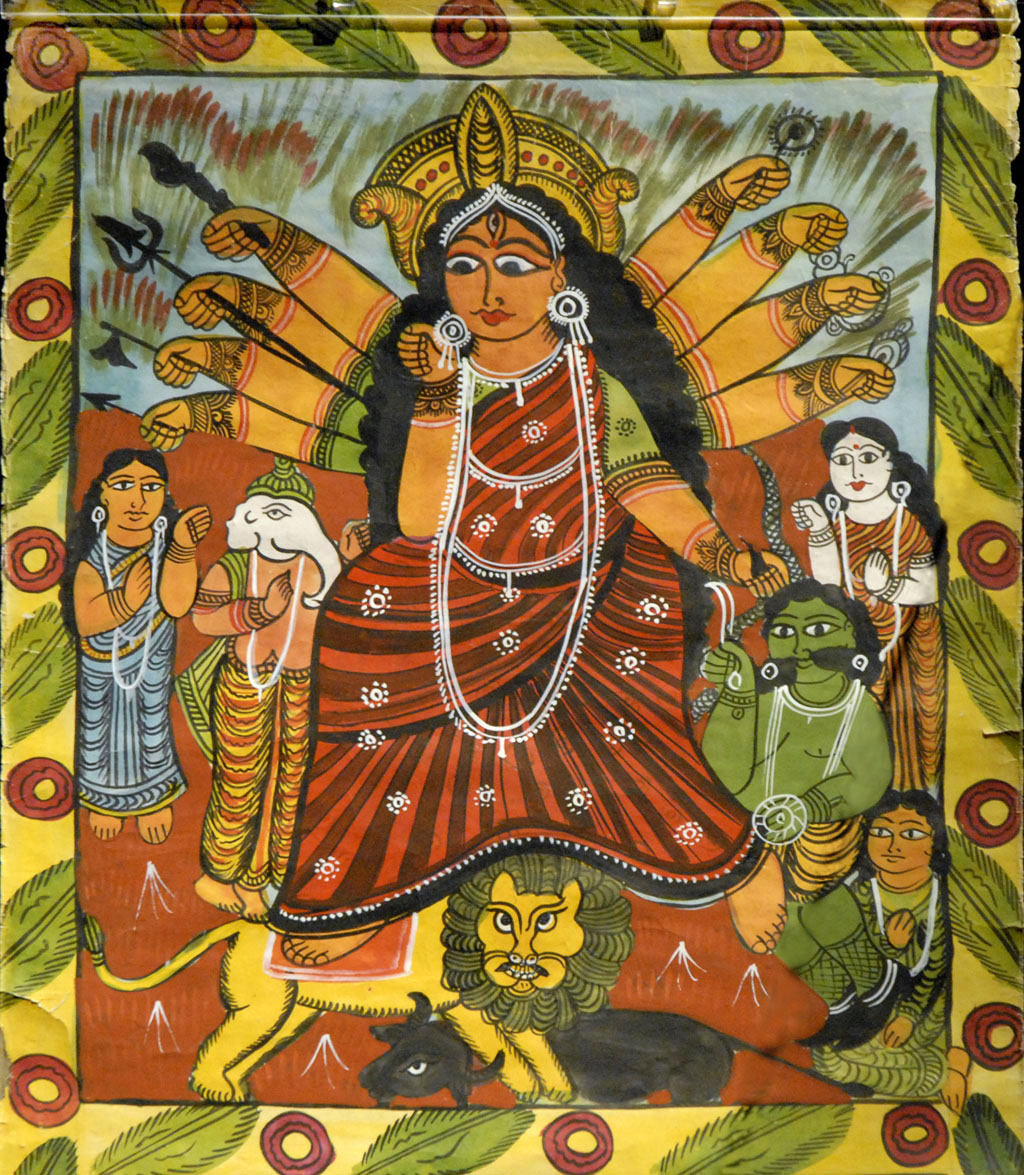 L'exposition "Singing Pictures, art and performance of naya's women" se déroule au musée national d'ethnologie de Lisbonne du 5 juillet au 31 décembre 2007. le site du musée national d'ethnologie le site sur les peintures des femmes Naya